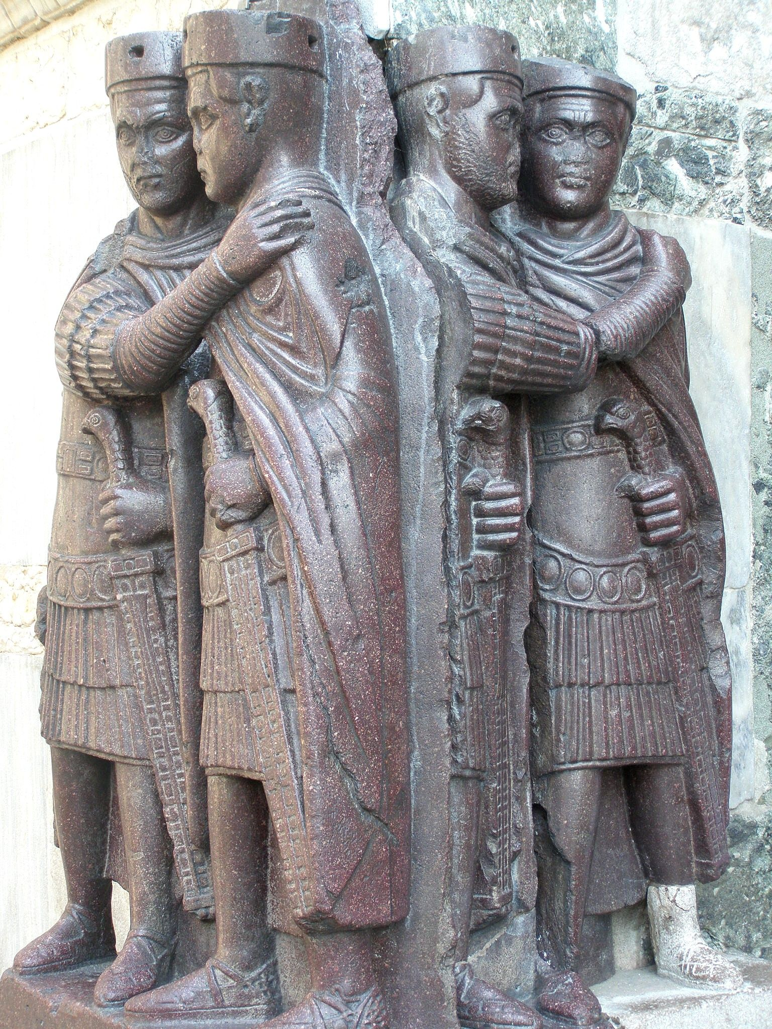 Tetrarchovia - súsošie na juhozápadnom nároží baziliky